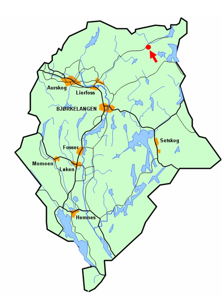 Stilisert kart som angir Malitjern sin lokalisering i Aurskog-Høland kommune.